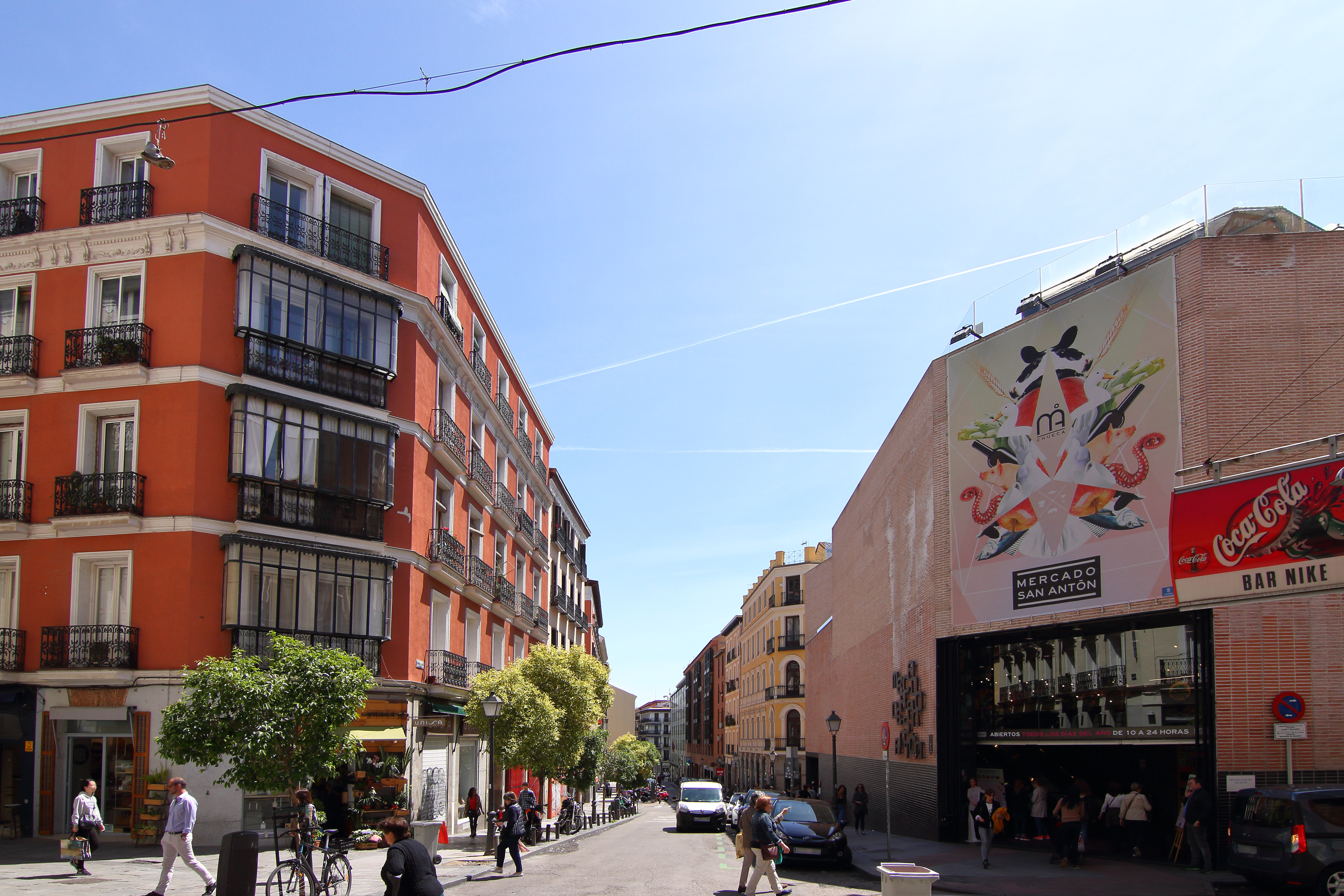 Calle de AugustoFigueroa, desde la calle Barbieri, Mercado de San Antón